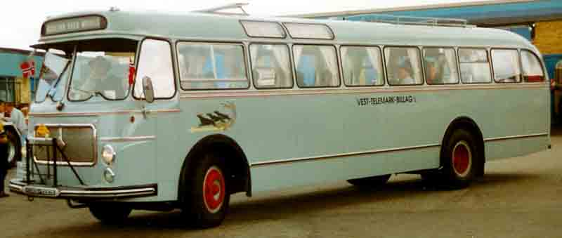 Scania-Vabis Bus